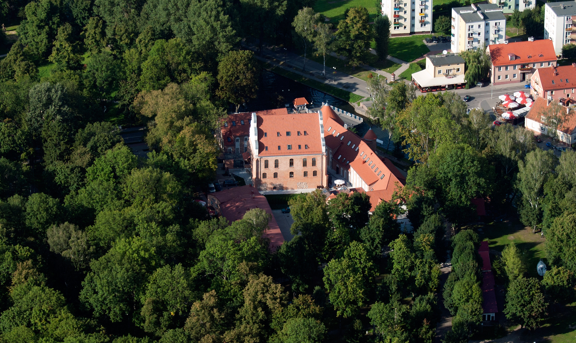 zamek zakonny - zachowane skrzydło Giżycko, Giżycko (gmina miejska)